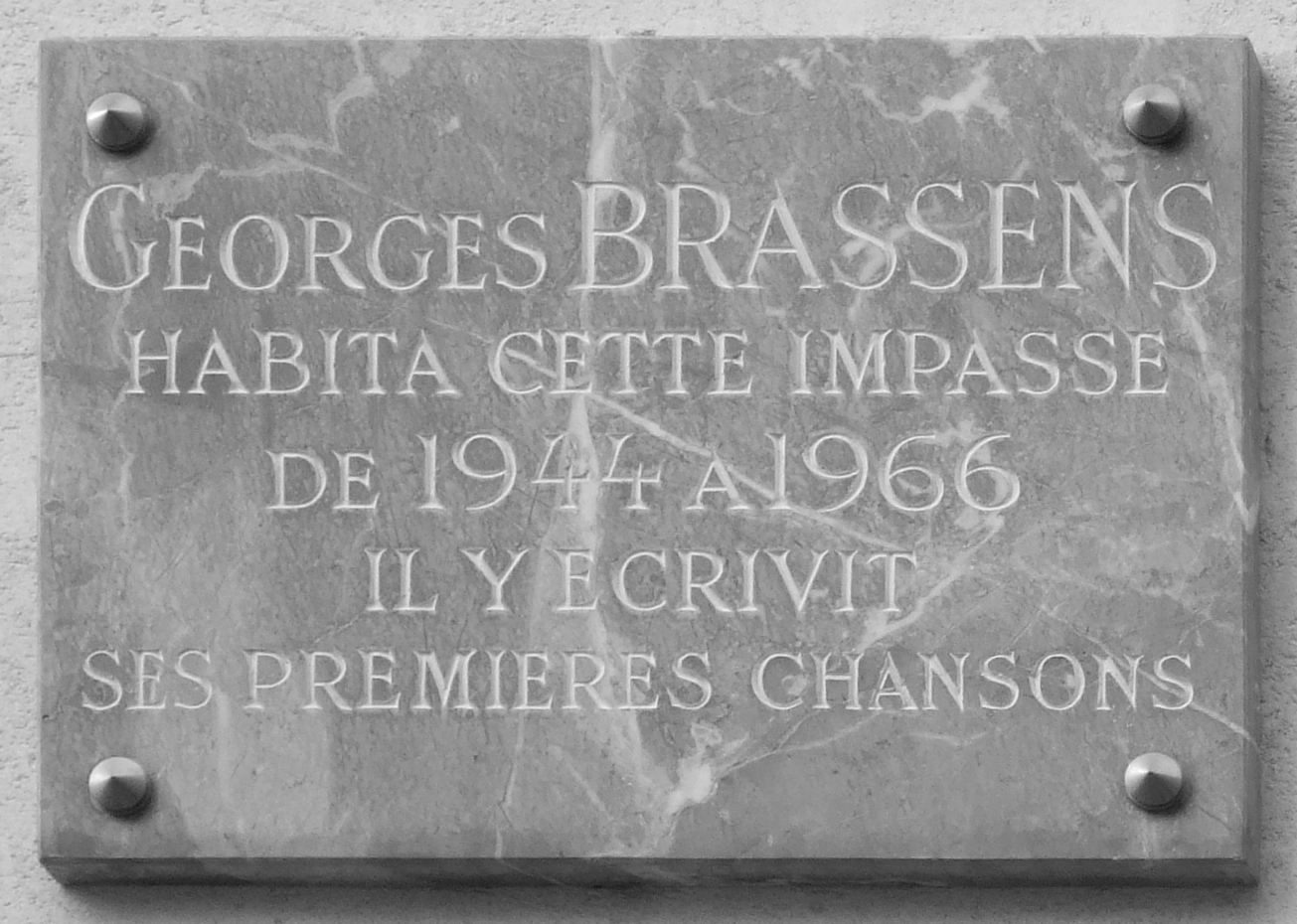 Impasse Florimont, Paris 14è, Métro Plaisance